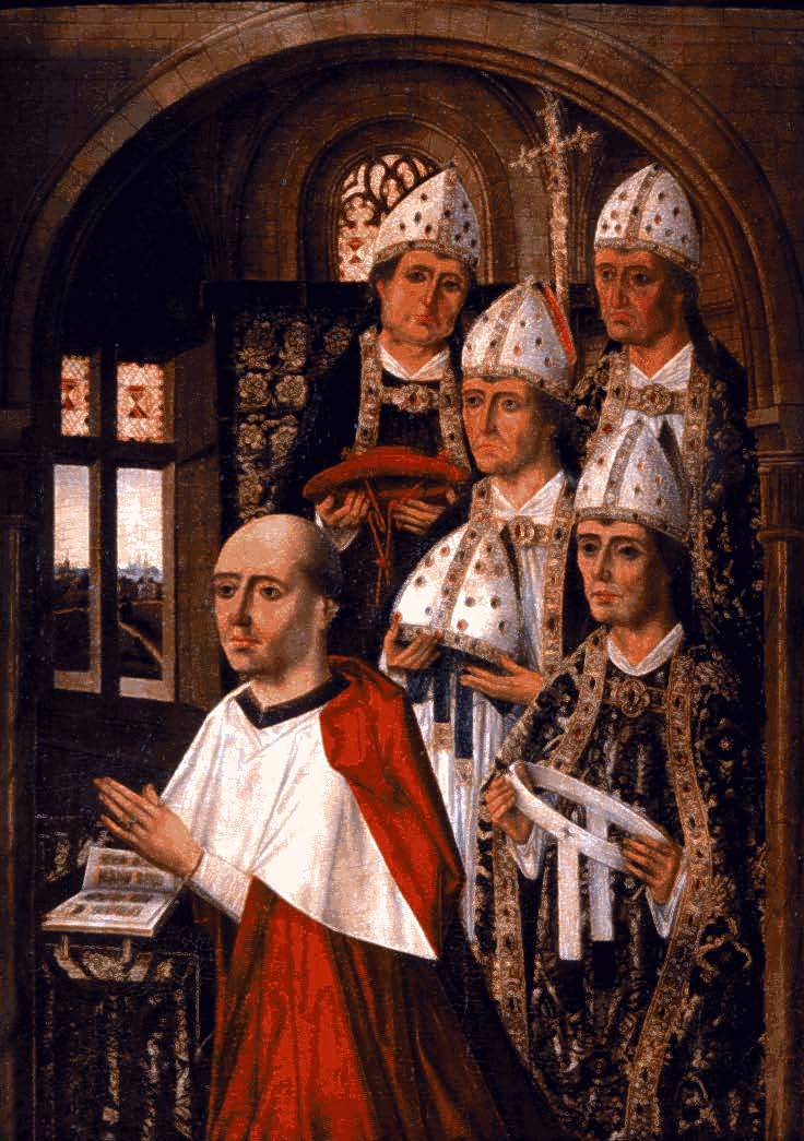 El Cardedal Mendoza, rodeado de obispos.